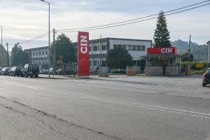 CIN